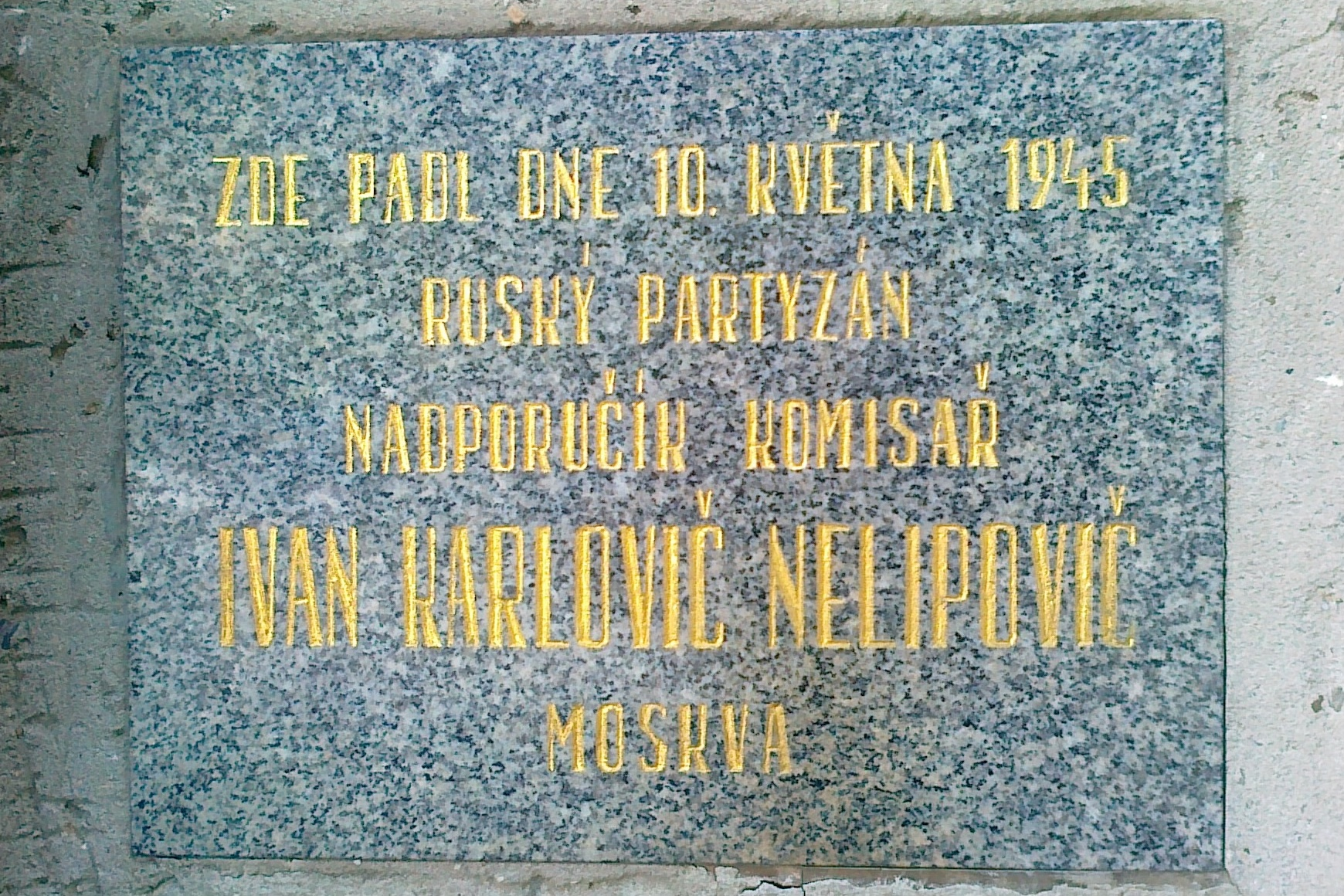 pamětní deska na domě